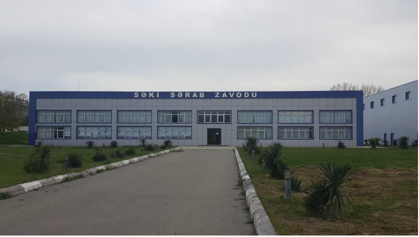 Şəki şəhərində yerləşən "ASK Şəki Şərab" MMC-nin əsas binası.